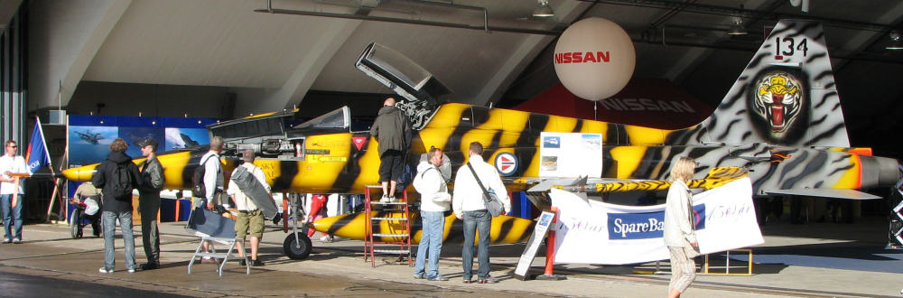 Tigermalt F-5 jagerfly ved Rygge Airshow 2007. Tilhørte 336 Eye of the Tiger skvadronen.